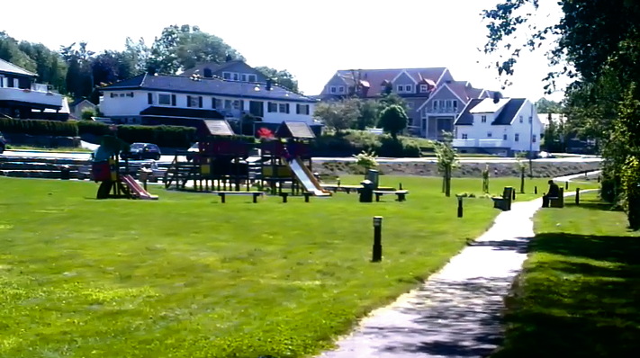 Selvaagparken på Bryne i Vanse ligger mellom Abraham Berges vei og Vansebekken (Bryneåna)